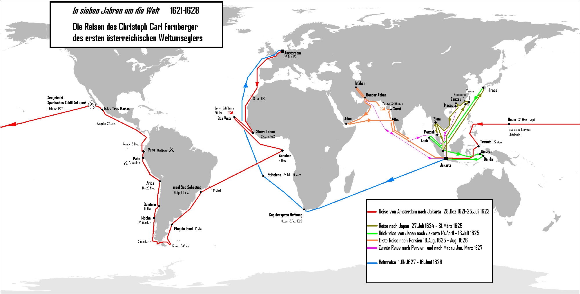 Fernbergers Weltumsegelung